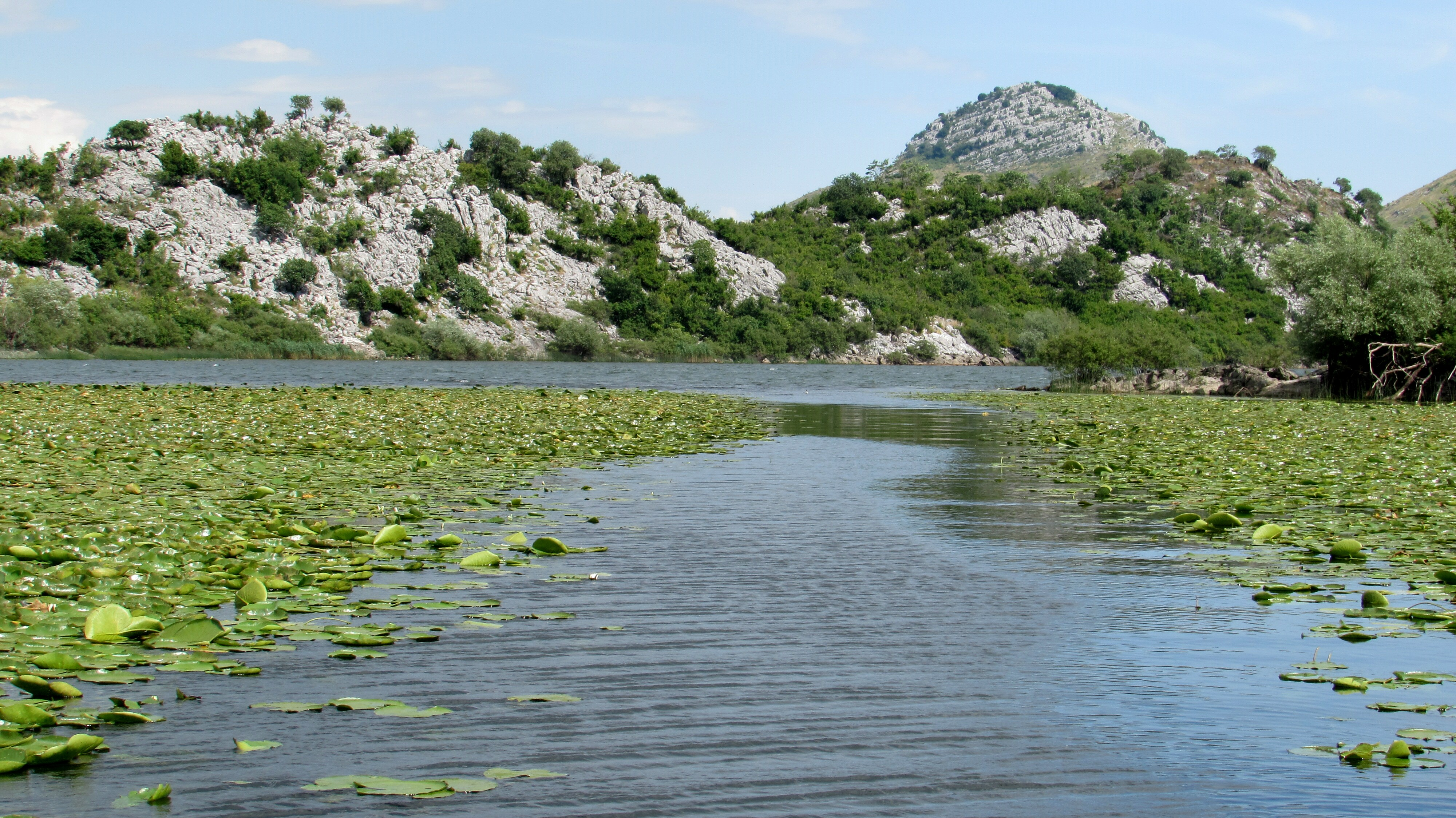 SkutariseeBeiVranjinaMontenegro